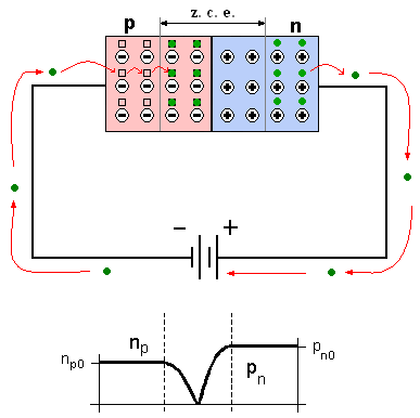 Polarización inversa de un diodo. Imagen creada por --Biohazard910 y Willy categoría: electrónica (imagen)